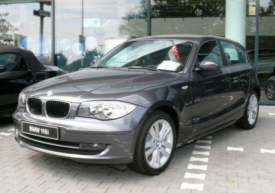 BMW E87 after facelift